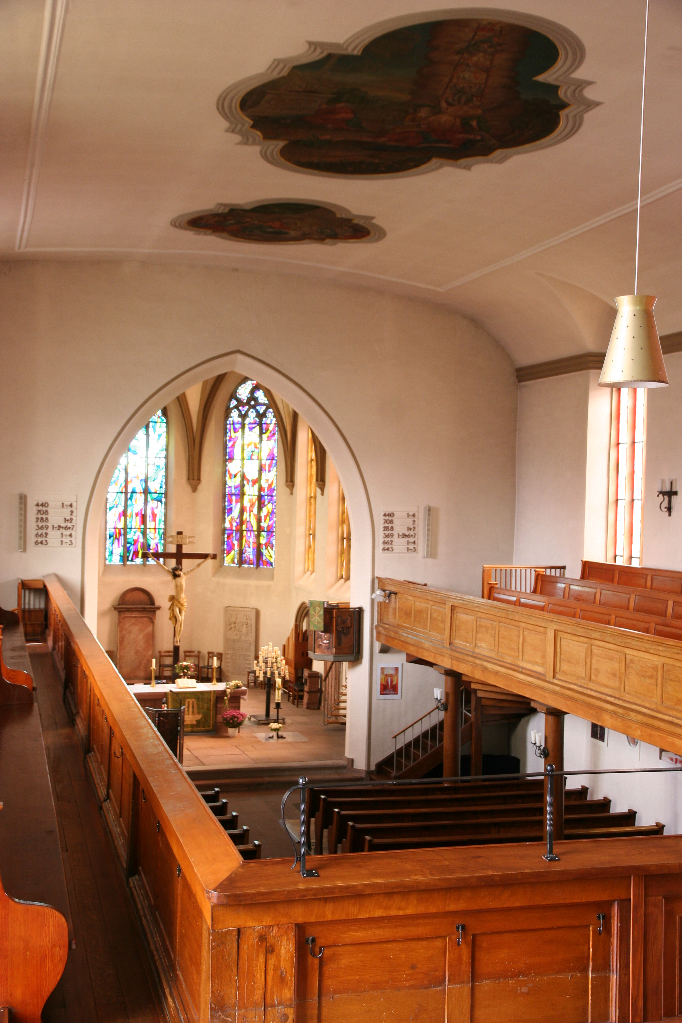 Evangelische St. Jakobskirche Gernsbach